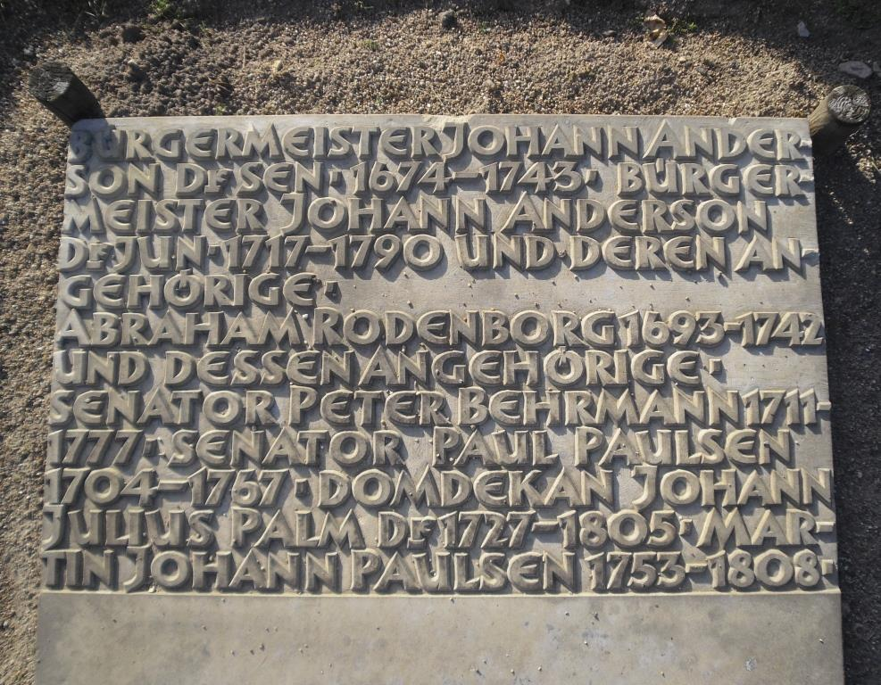 Erinnerung an Johann Anderson (1674-1743), Natur- und Sprachforscher, Jurist und Hamburger Bürgermeister; Sammelgrabmaltafel Althamburgischer Gedächtnisfriedhof (Ohlsdorfer Friedhof), Hamburg